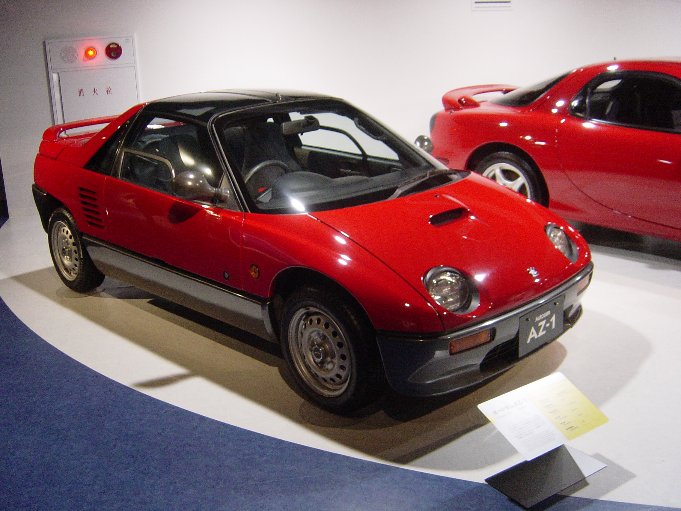 Mazda AZ-1(マツダ・AZ-1),Mazda Museum